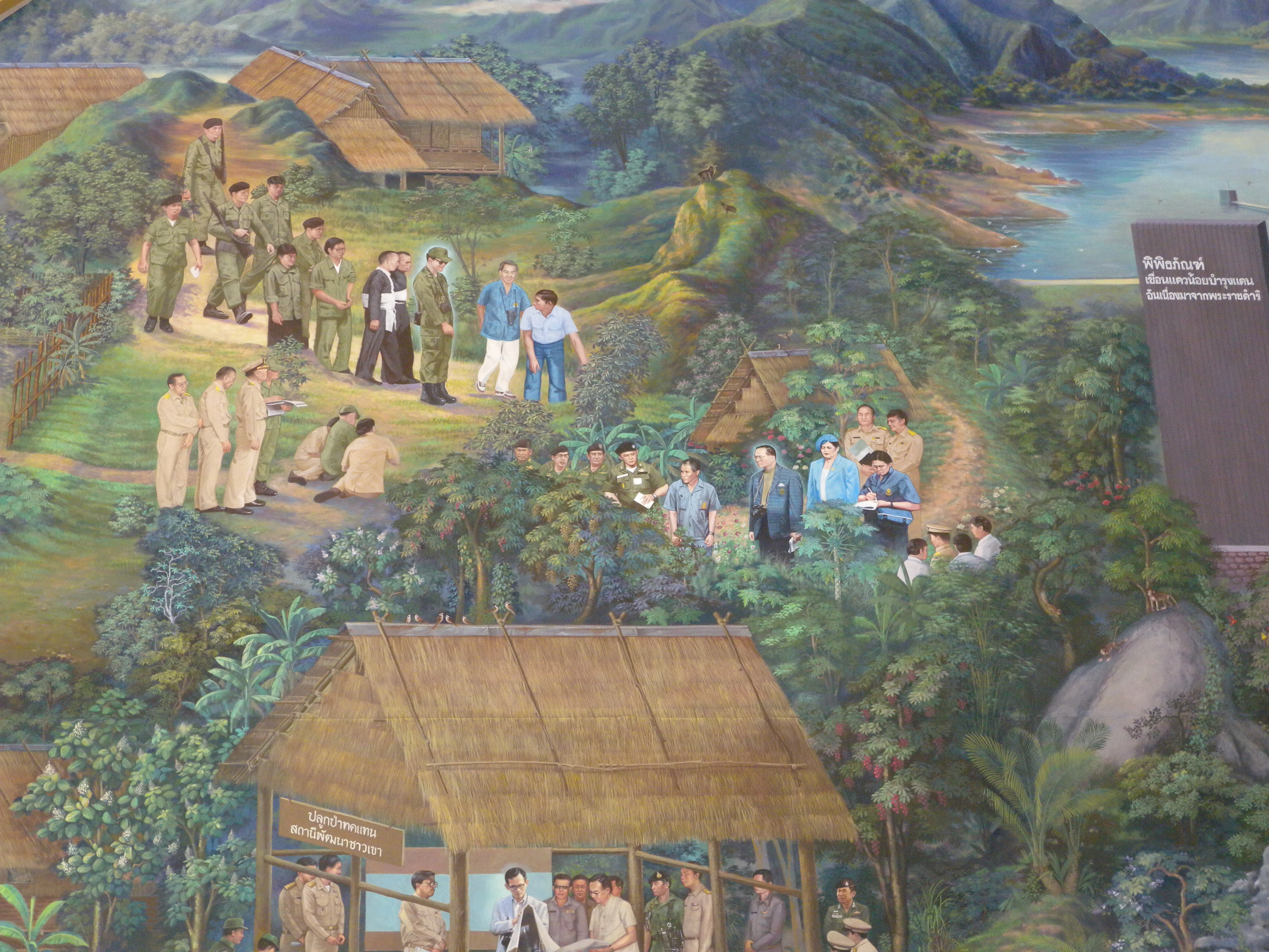 จิตรกรรมฝาผนังเล่าเรื่องโครงการในพระราชดำริ โครงการอันเนื่องมาจากพระราชดำริ และโครงการส่วนพระองค์ในพระบาทสมเด็จพระปรมินทรมหาภูมิพลอดุลยเดช ภายในพระที่นั่งทรงธรรม มณฑลพระราชพิธีถวายพระเพลิงพระบรมศพพระบาทสมเด็จพระปรมินทรมหาภูมิพลอดุลยเดช ในภาพนี้ แสดงภาพการเสด็จพระราชดำเนินไปทรงปฏิบัติพระราชกรณียกิจต่างๆ ในพื้นที่ภาคเหนือของประเทศไทย